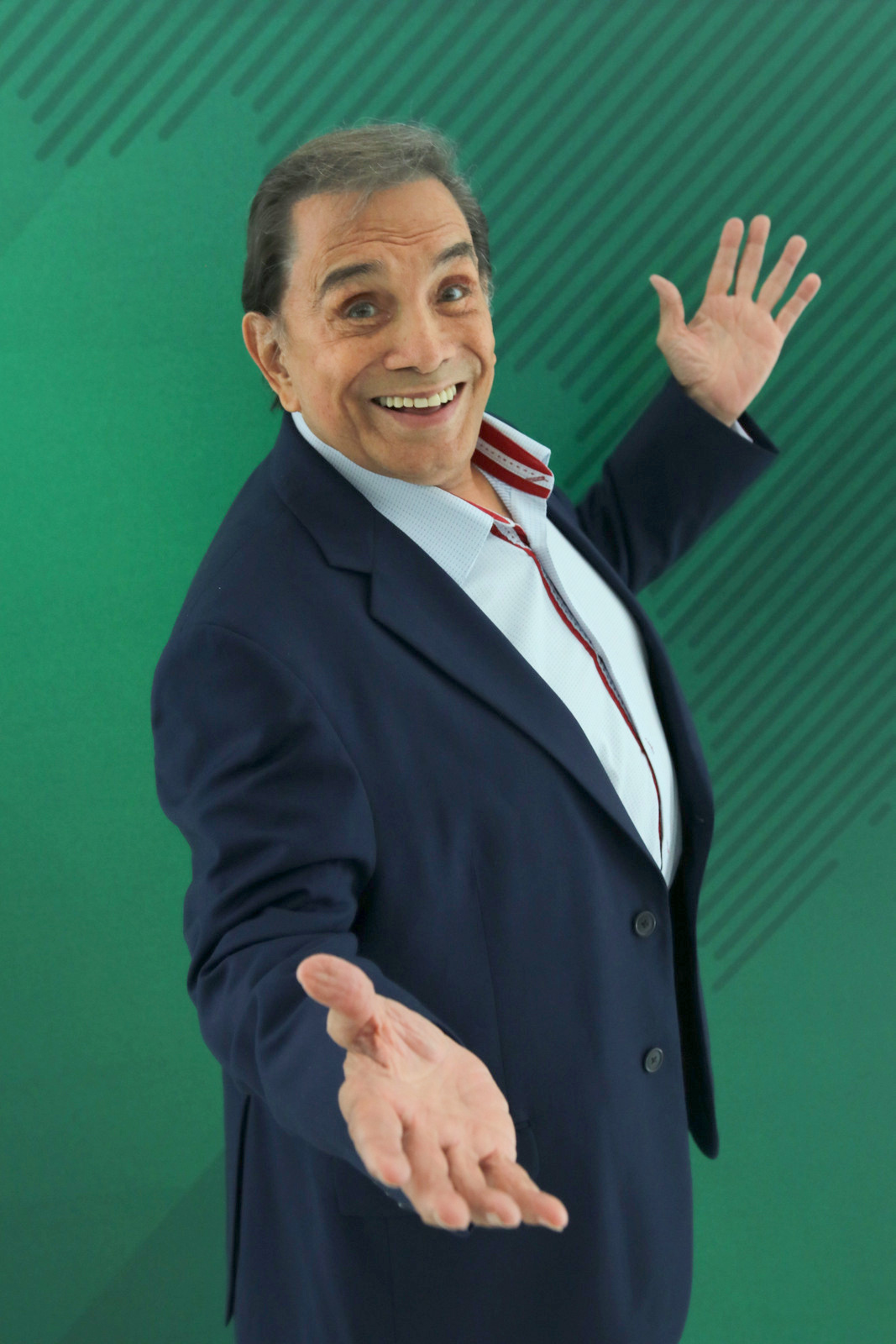 Música e cores permearam a cerimônia da Ordem do Mérito Cultural (OMC), maior honraria pública da cultura, na noite desta quarta-feira (28), no Palácio do Planalto, em Brasília (DF). Em clima de festa, as insígnias foram entregues pelo presidente da República, Michel Temer; além do ministro da Cultura, Sérgio Sá Leitão; o ministro-chefe da Casa Civil, Eliseu Padilha; e a primeira-dama, Marcela Temer; a 35 personalidades e instituições que se destacaram no cenário cultural, contribuindo para o desenvolvimento do País. O tema da OMC deste ano, Cultura Gera Futuro, reforçou a economia criativa como vetor fundamental para o desenvolvimento econômico e social do País. Esta visão da cultura norteou a gestão do ministro Sá Leitão e foi o eixo central das políticas, programas e eventos realizados pelo Ministério da Cultura (MinC) em 2017 e 2018. Tanto que o tema da OMC 2017, Cultura Inovação e Empreendedorismo, já seguia esta linha. "As atividades culturais e criativas são vocações da sociedade brasileira e constituem um setor dinâmico da economia e da vida social do País", defendeu. 28/11/2018 DEDÉ SANTANA FOTOS: Ronaldo Caldas e Clara Angeleas/Ascom/MinC